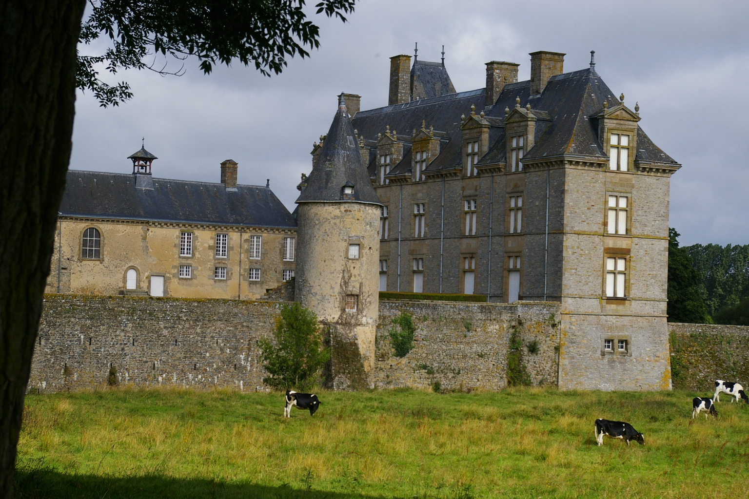 Château de Montécler à Châtres-la-Forêt (Mayenne)